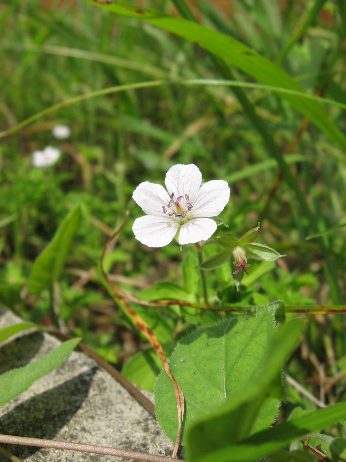 ゲンノショウコ (Geranium thunbergii)